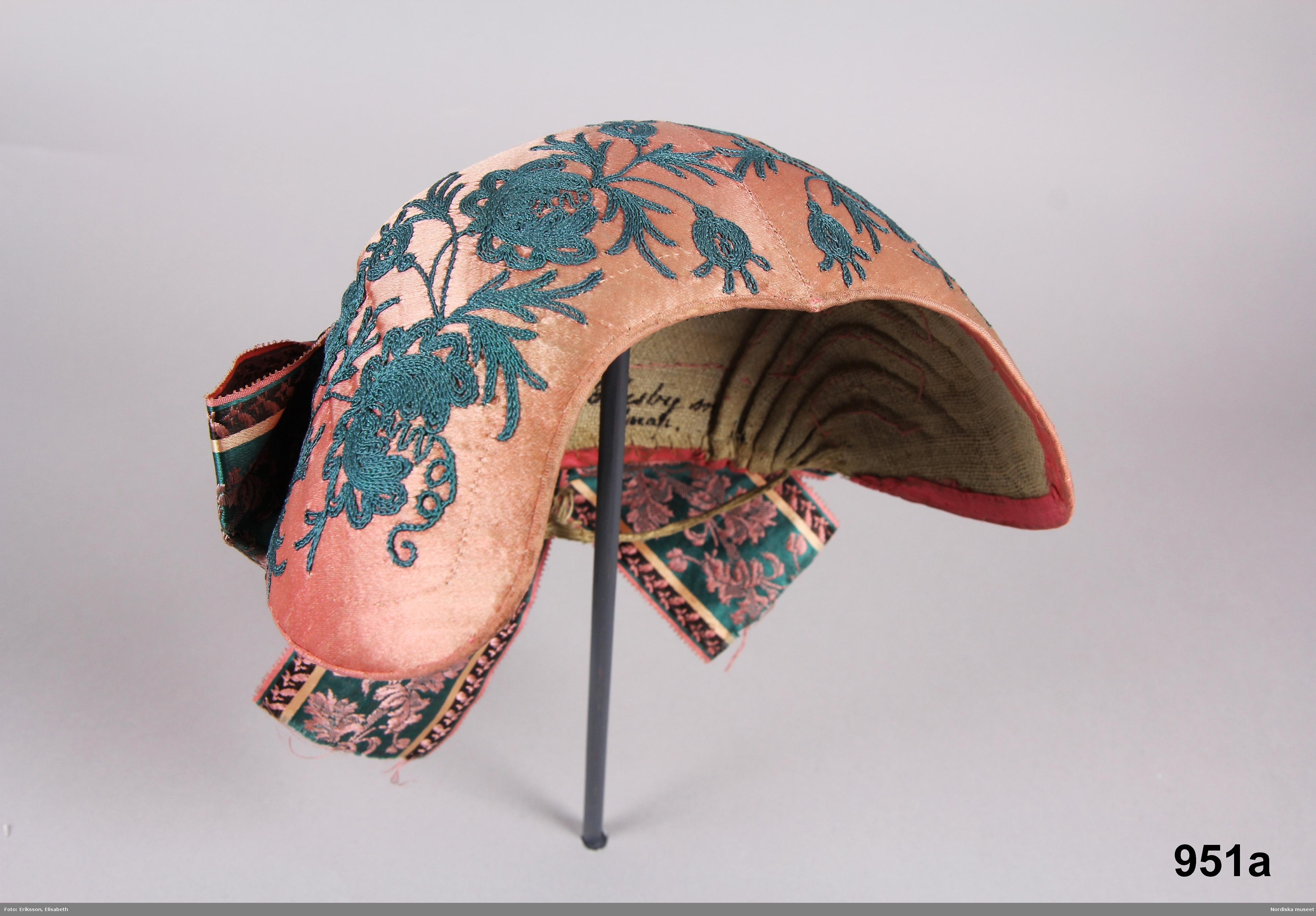 Bindmössa